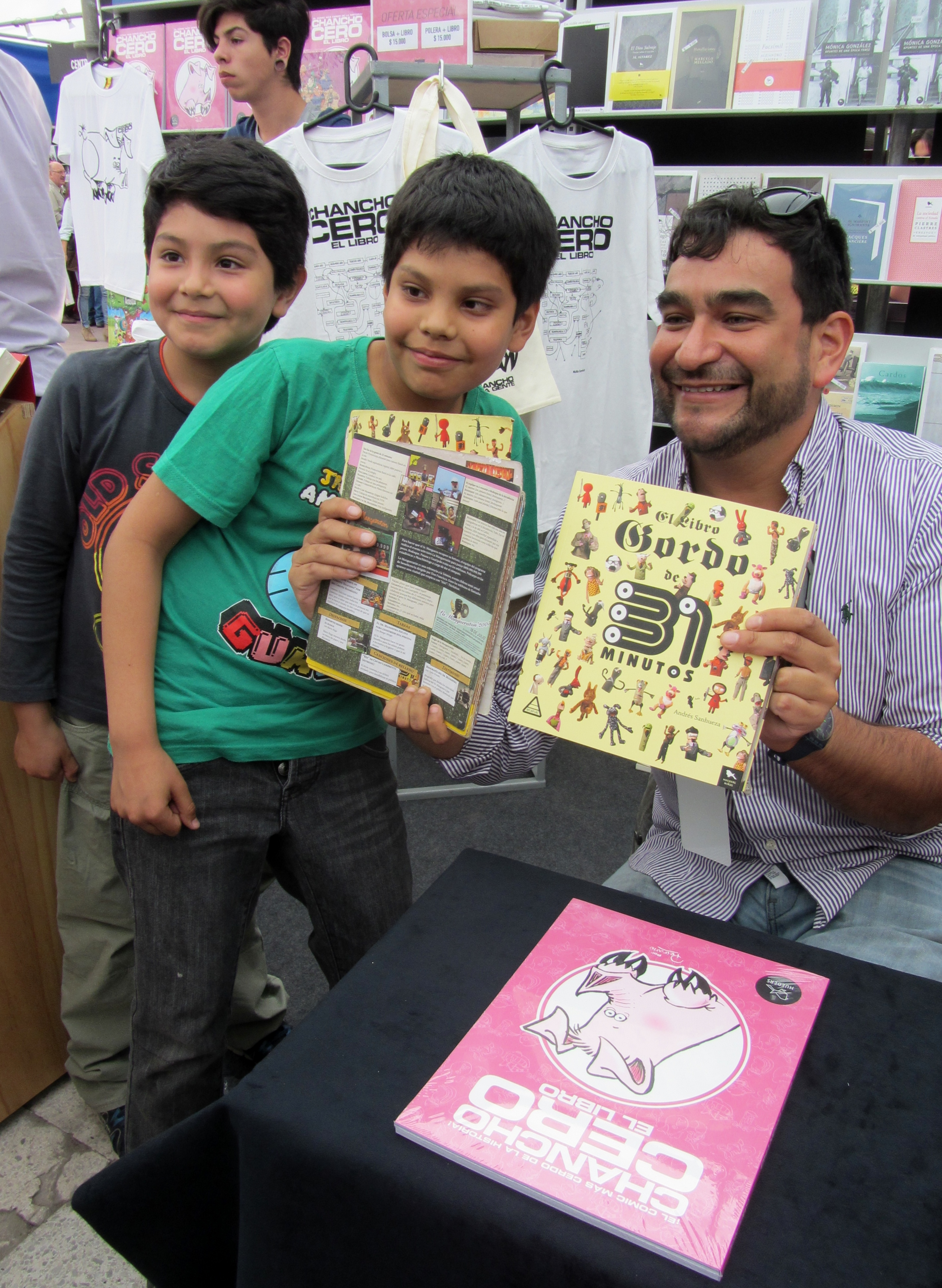 El historietista y guionista chileno Pedro Peirano en la Feria Internacional del Libro de Santiago 2015